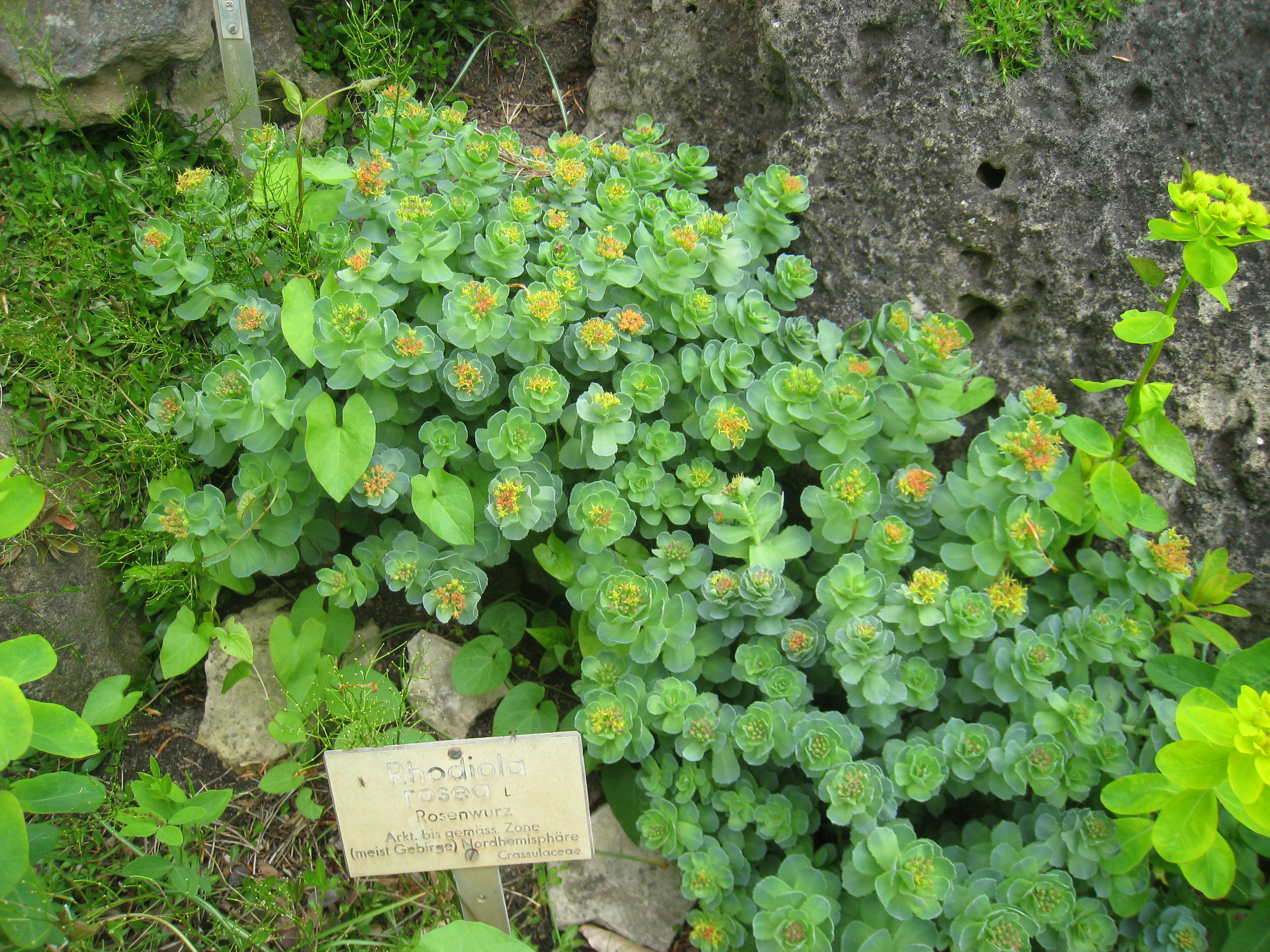 Rhodiola rosea specimen, in the Botanischer Garten, Berlin-Dahlem (Berlin Botanical Garden), Berlin, Germany.